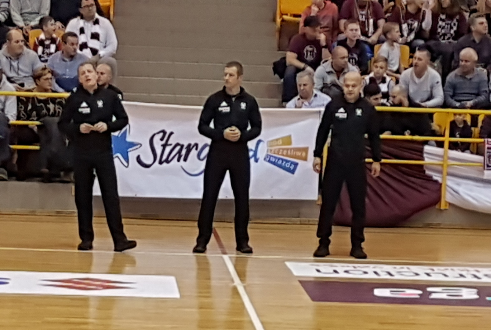 Sędziowie meczu Spójnia - Dąbrowia (09.12.2018)